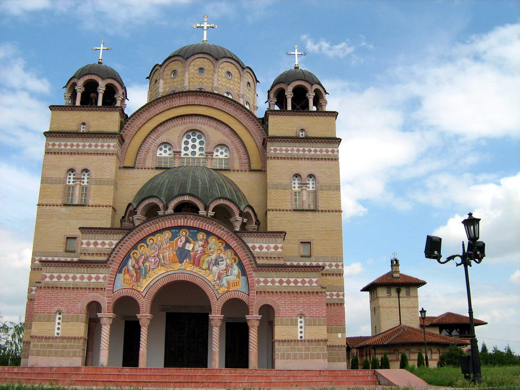 L'église orthodoxe d'Apatin, en Serbie, province autonome de Voïvodine